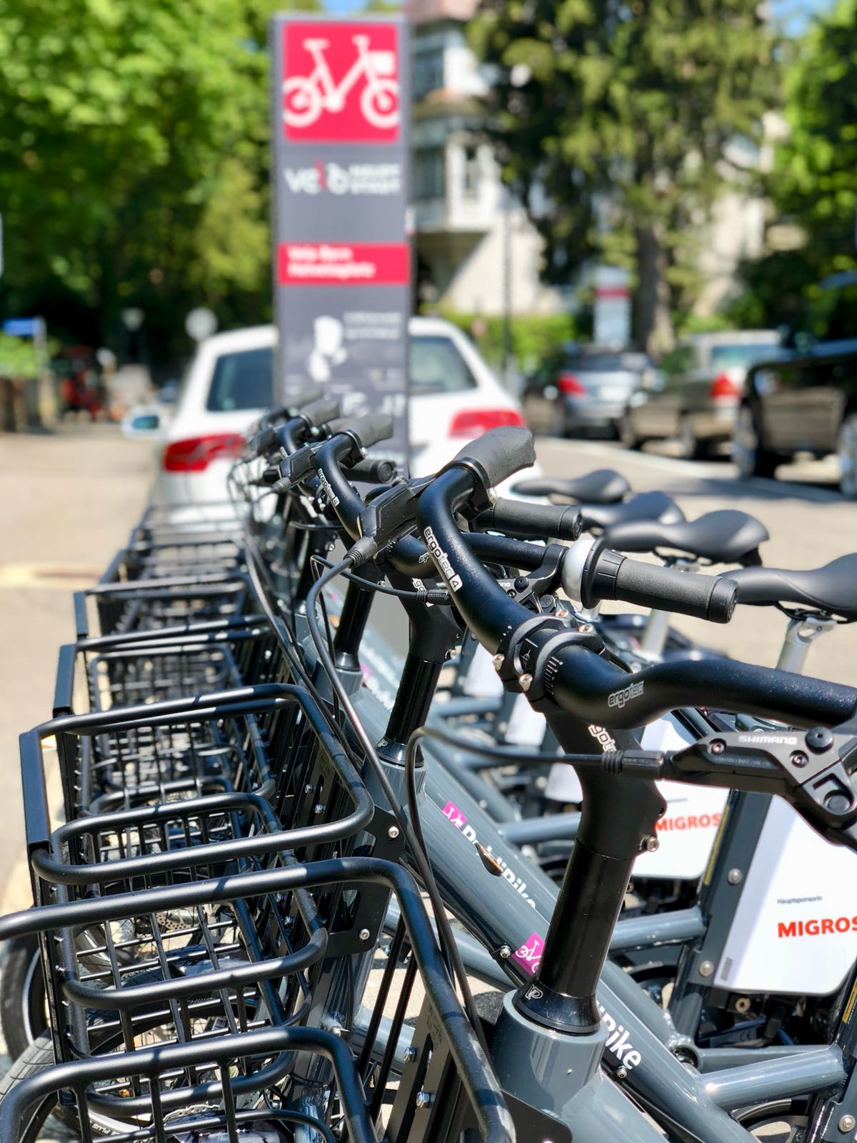 Station Bern